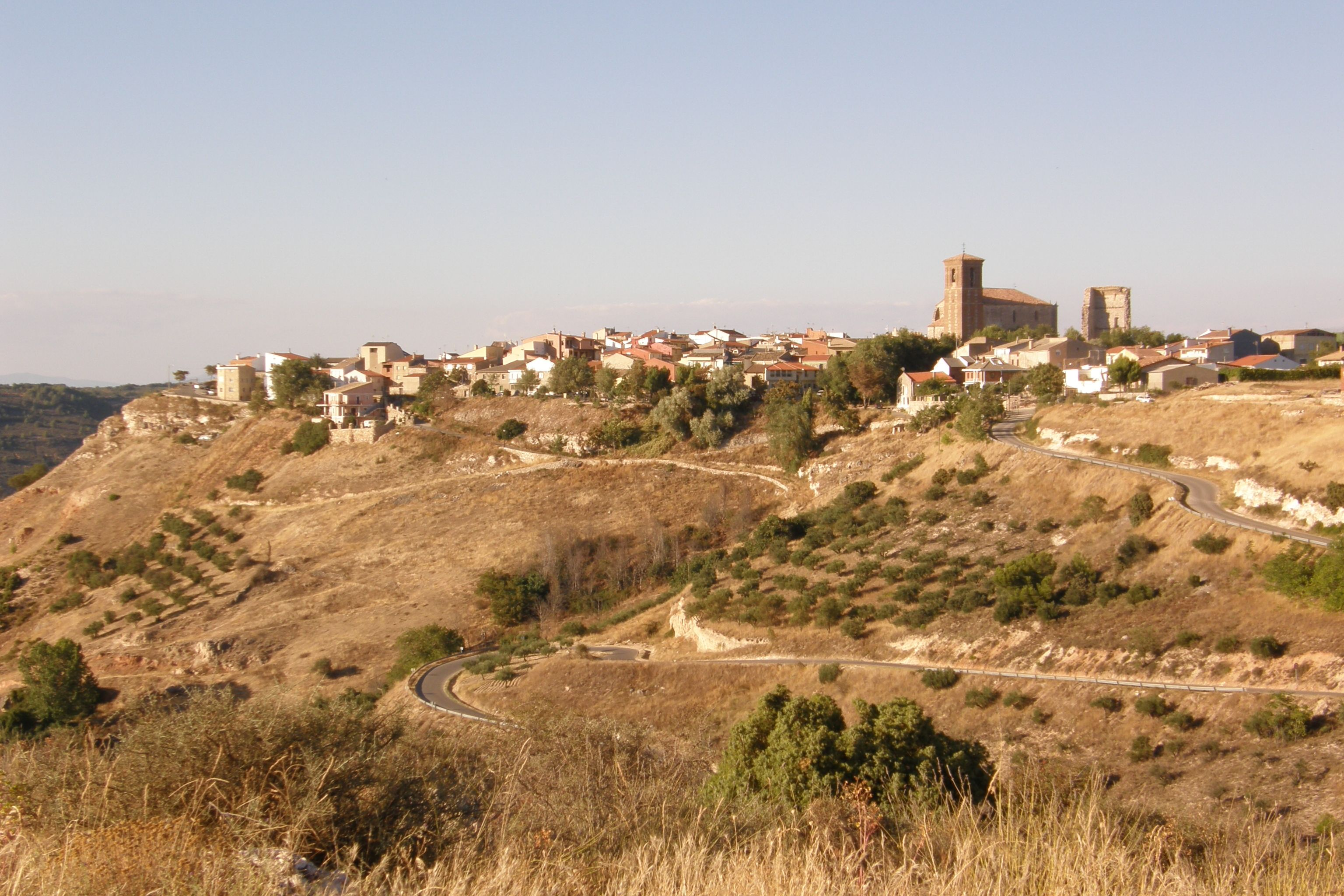 Vista desde el oeste de Valfermoso de Tajuña y campos